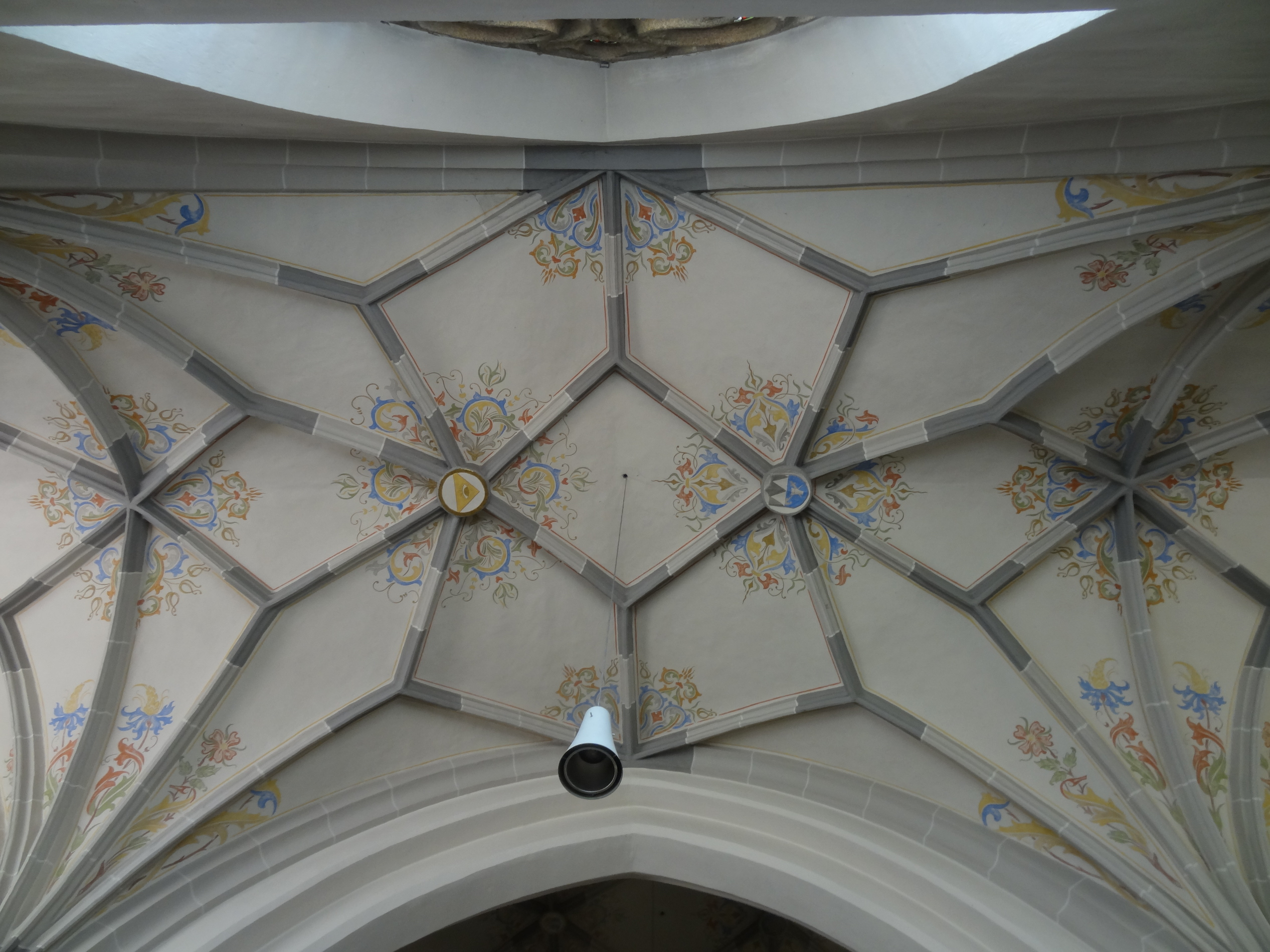 Gewölbekonfiguration im rechten Seitenschiff der Pfarrkirche St. Peter in Velden an der Vils (Lkr. Landshut)